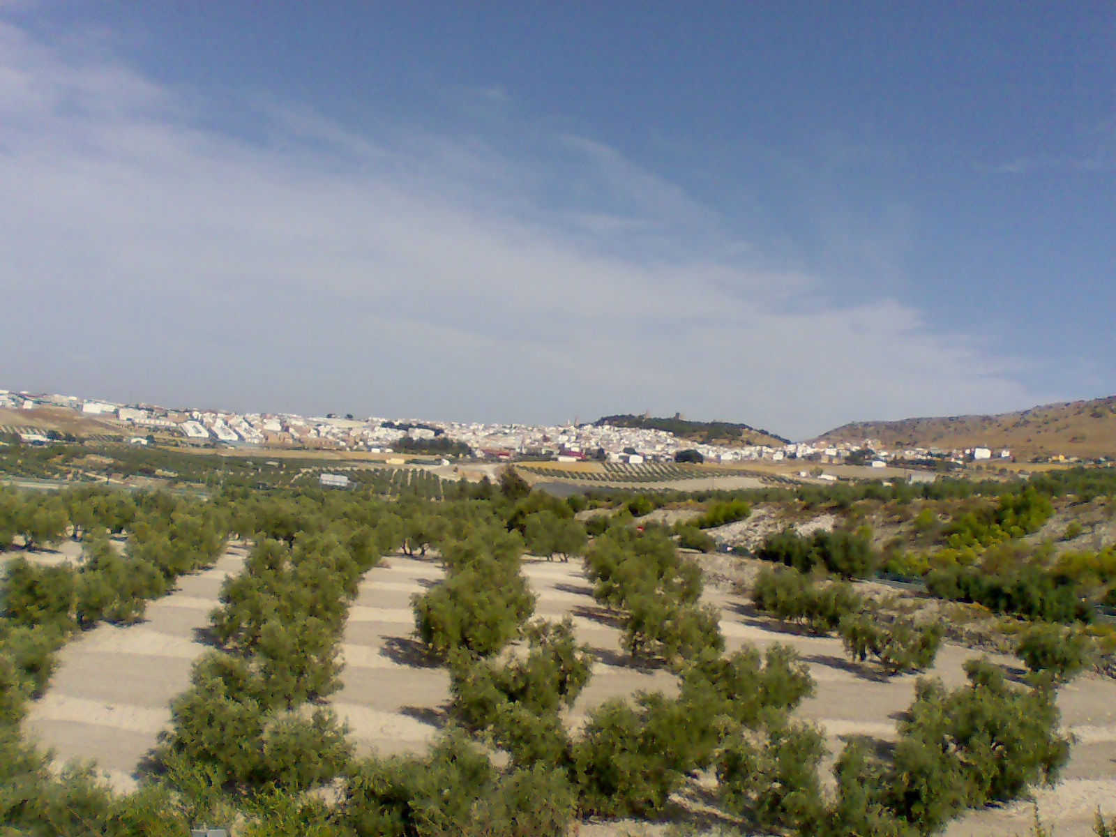 Vista de Estepa (Sevilla) y sus campos